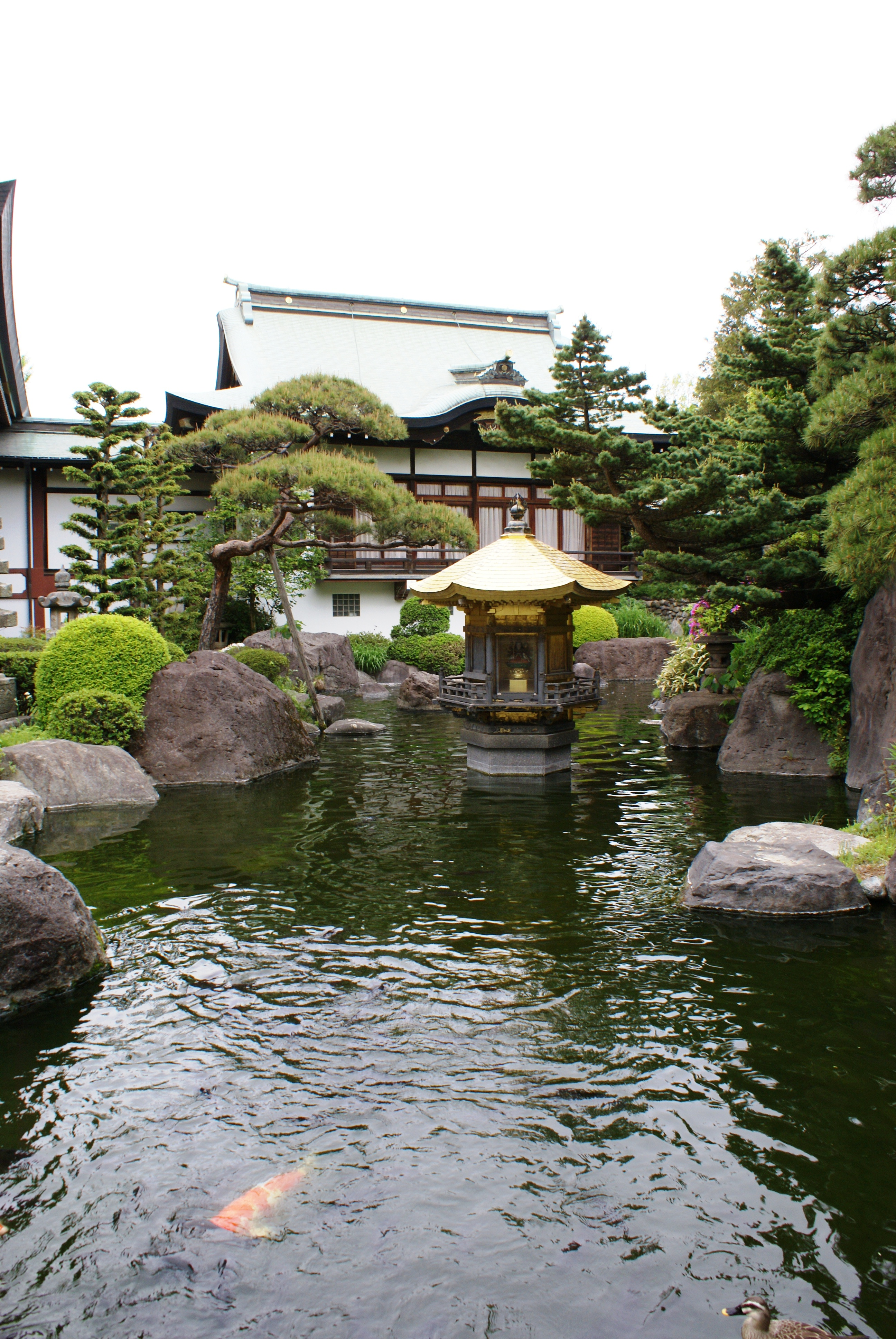 赤塚山乗蓮寺